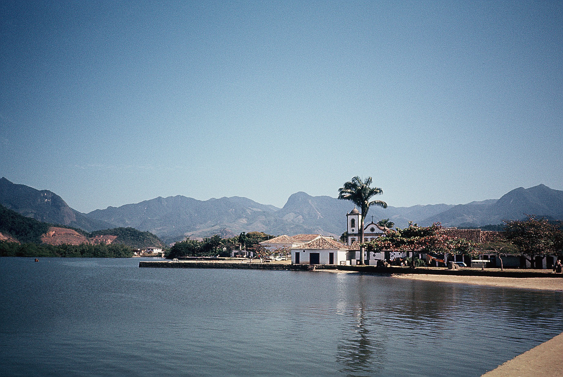 Rio de Janeiro, Paraty, Brasilien